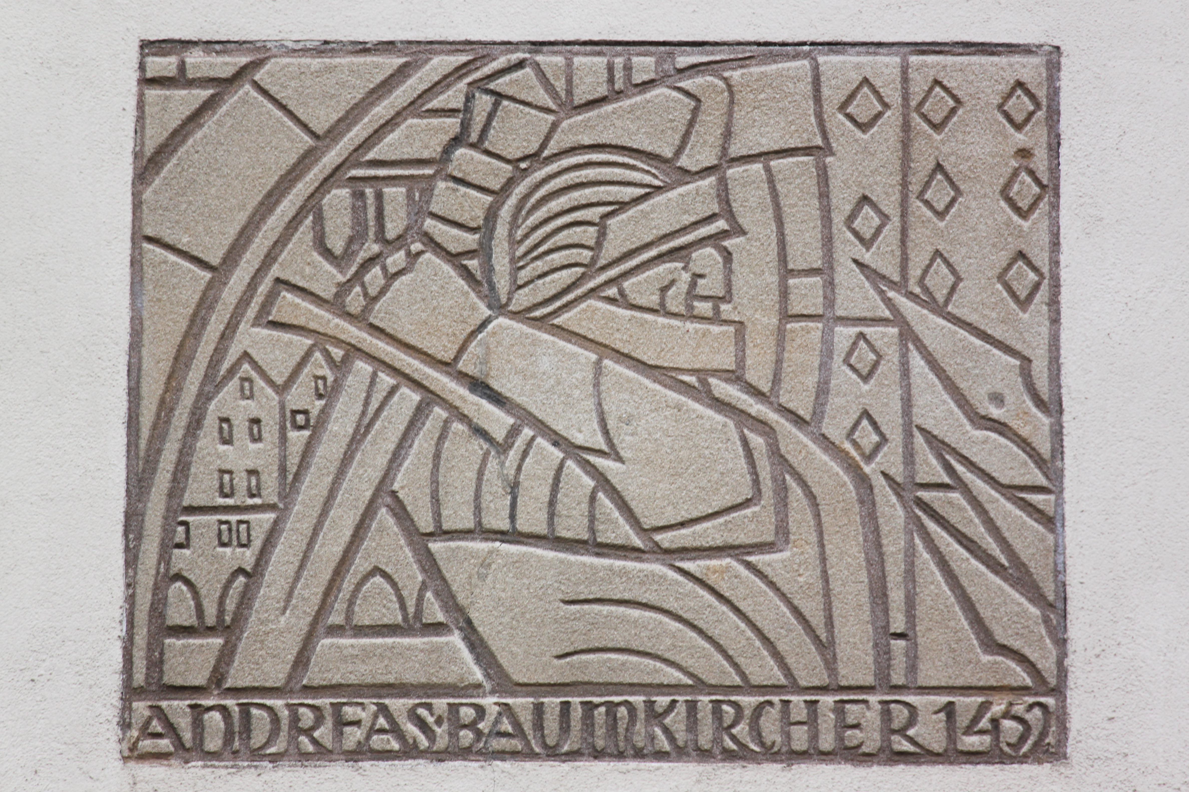 Zum weißen Rössl (Wiener Neustadt), Sgraffito zu Andreas Baumkircher vom Maler Hans Vonmetz (1937)